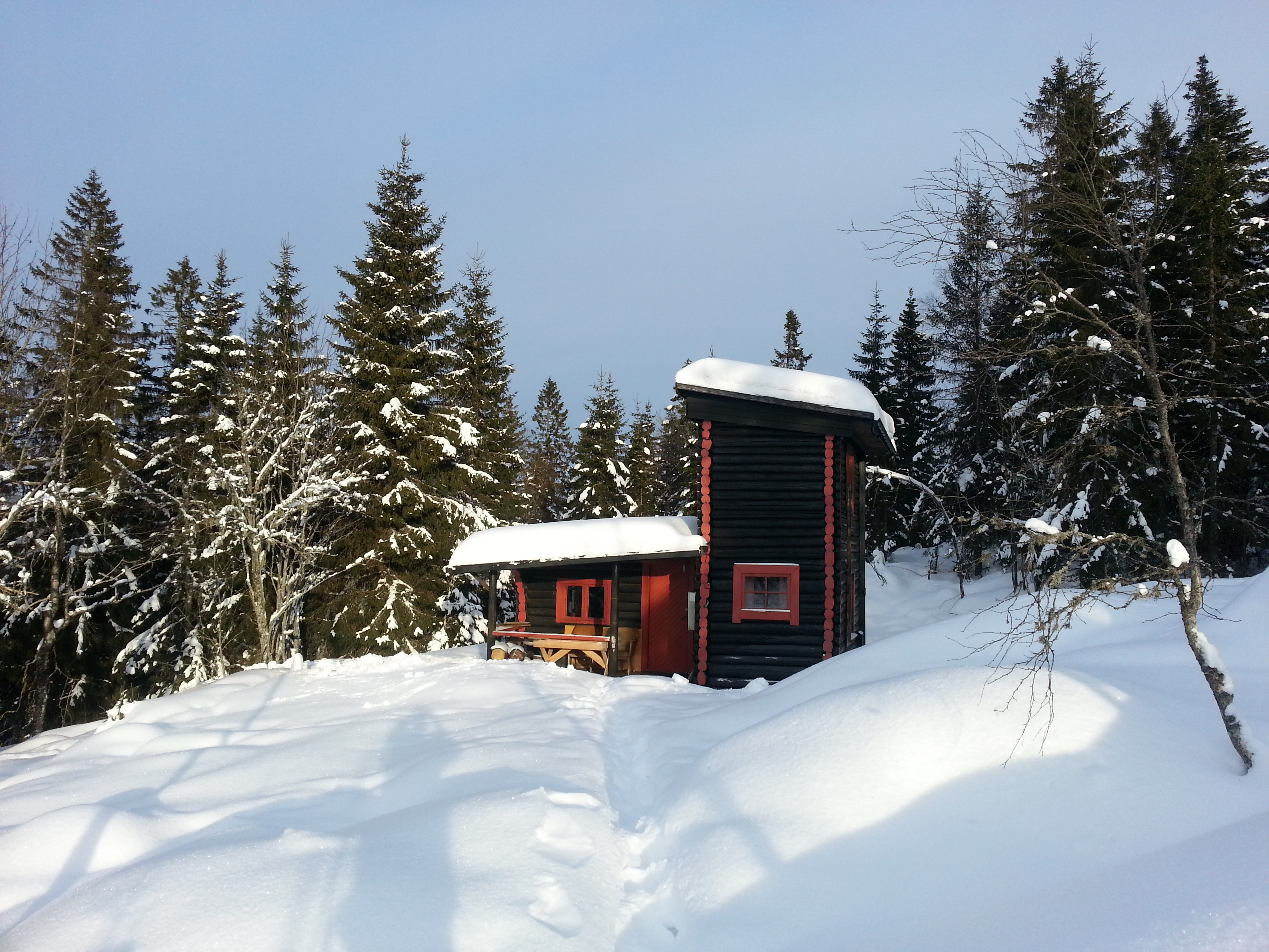 Fjeroshytta vinteren 2013